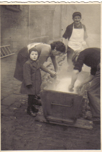 Schlachtfest in Fischbach, 1944